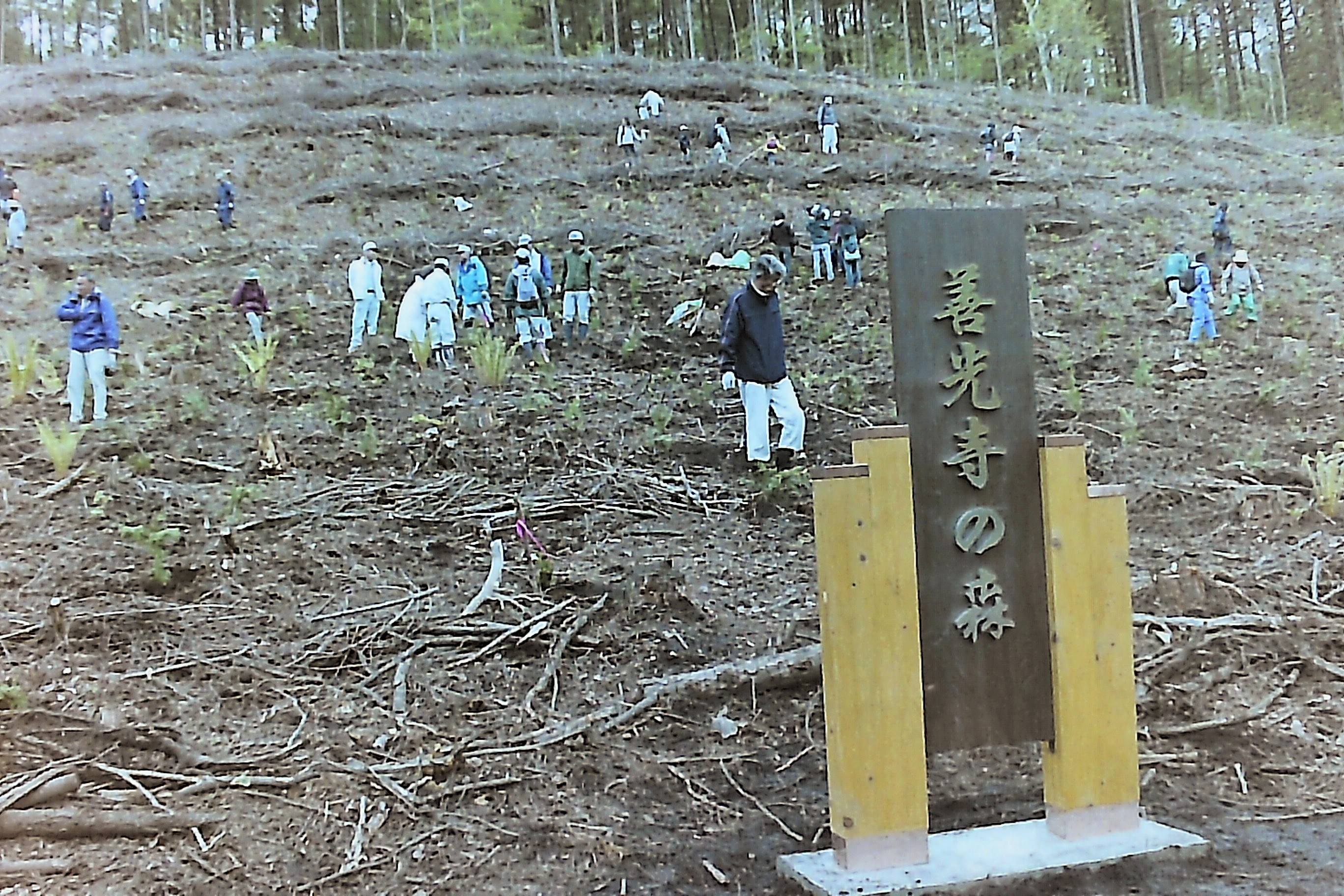 2007年5月20日に行われた善光寺建築資材を育成する「善光寺の森」植樹